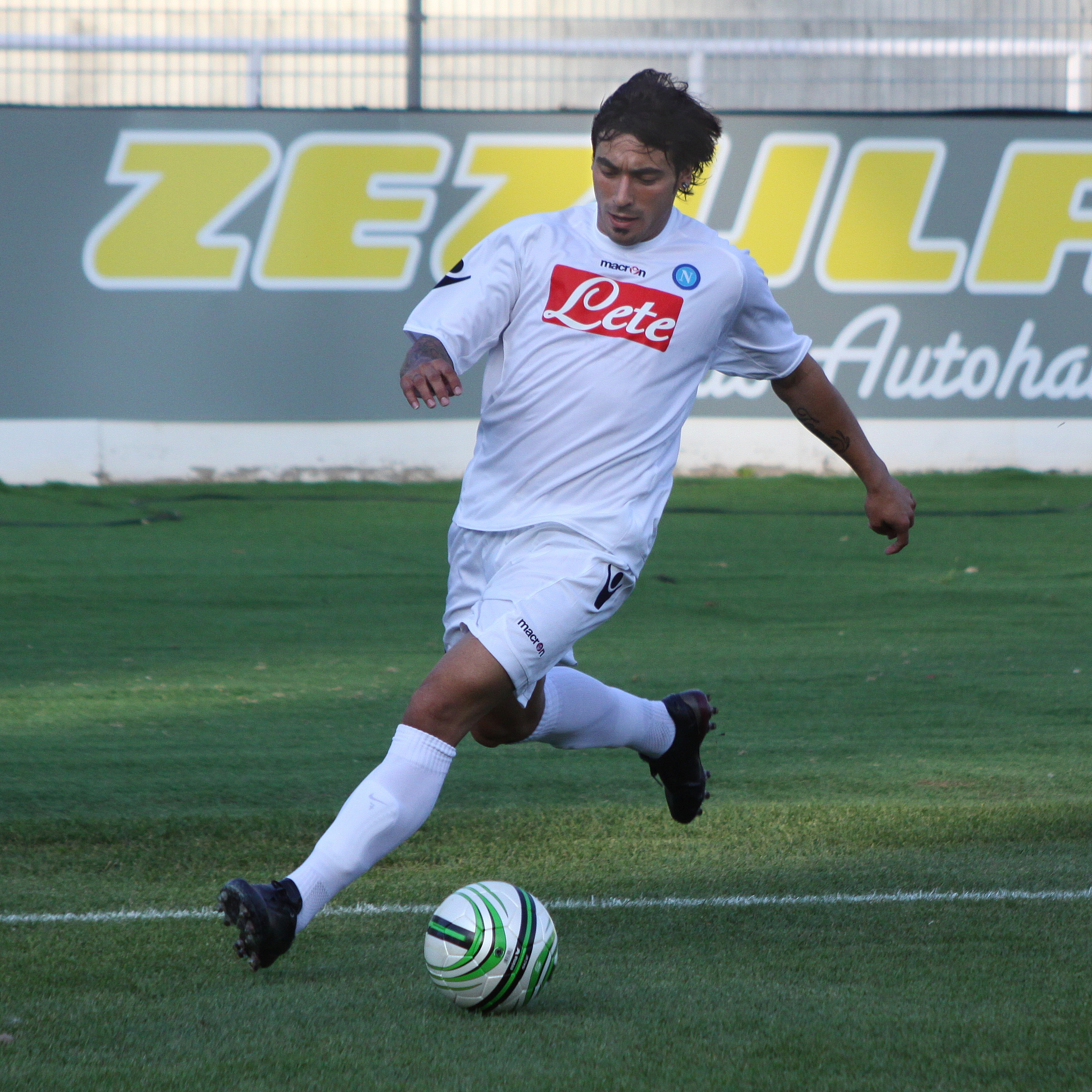 Ezequiel Lavezzi - SSC Neapel (3) Ezequiel Lavezzi - Società Sportiva Calcio Napoli